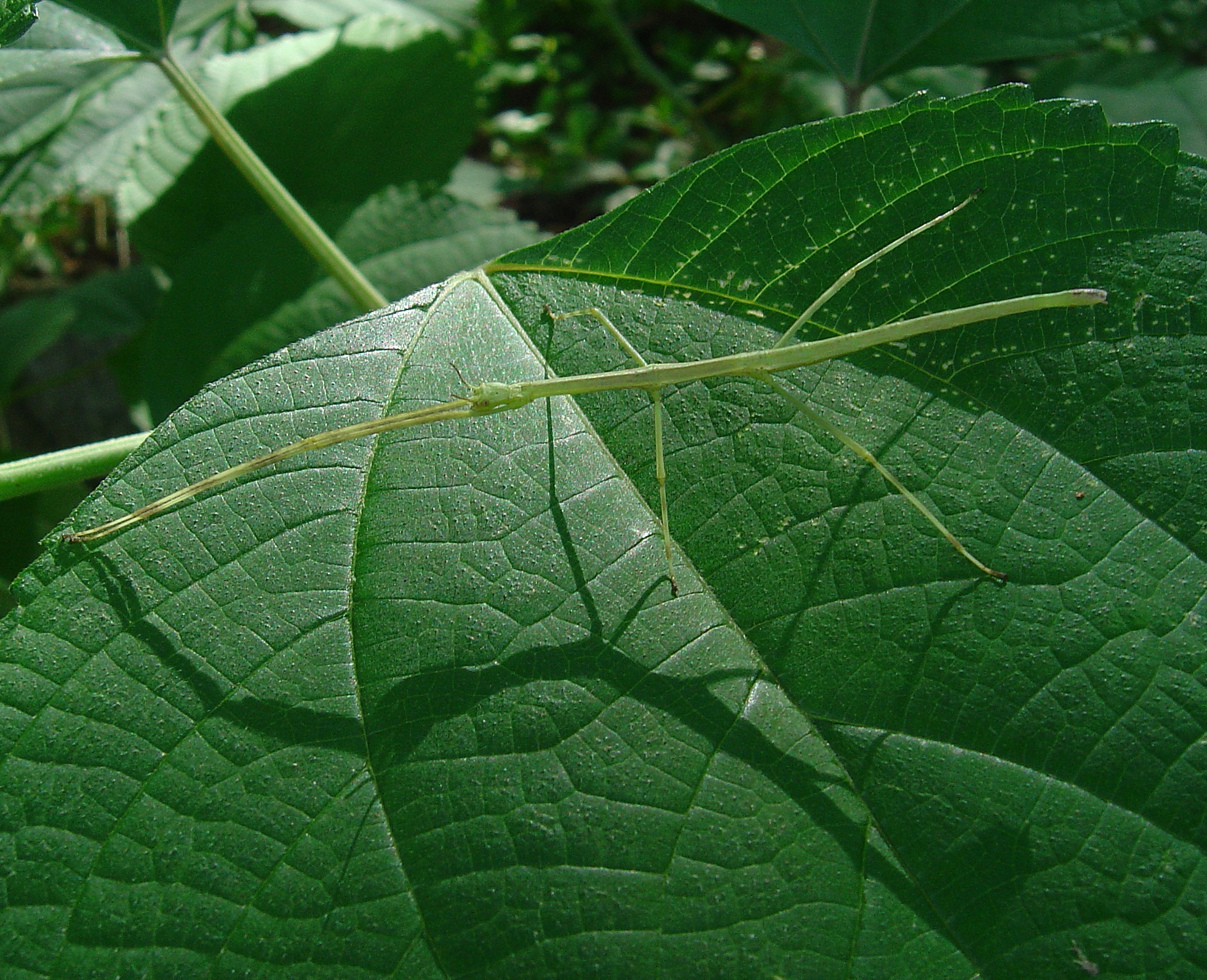 Ramulus irregulariterdentatus.